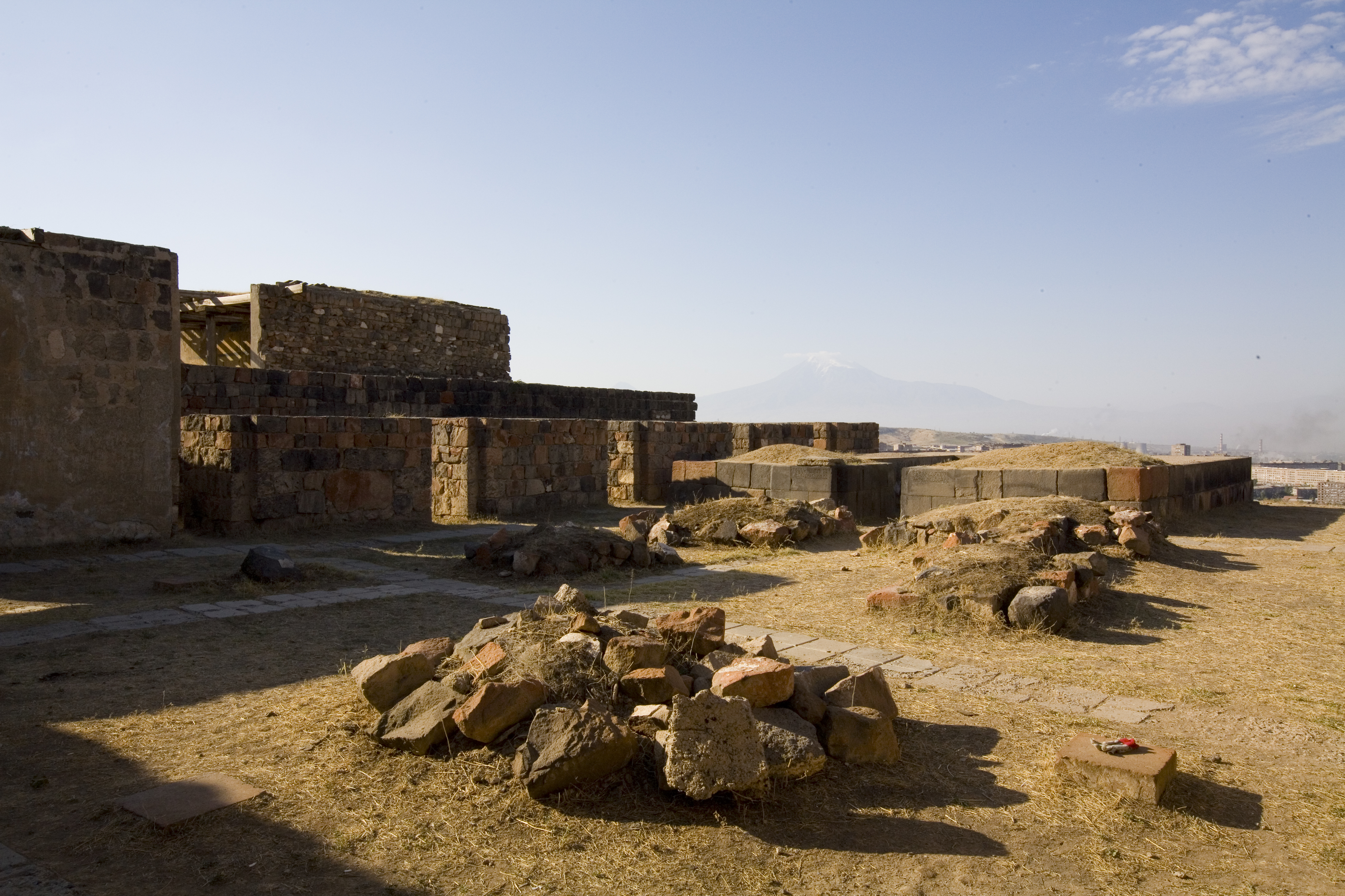 Susi Urartian Temple in Erebuni